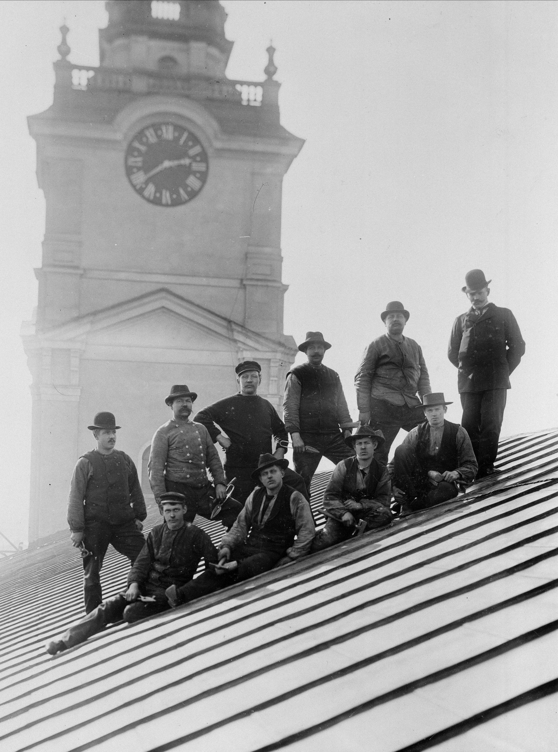 Depicted place: Stockholm, Storkyrkan, Gamla stan (Sverige (SE))